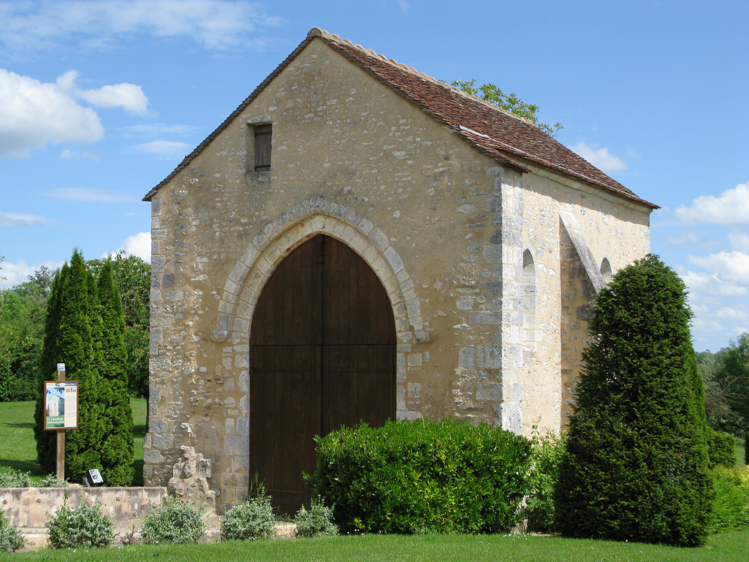 Chapelle Saint-Aignan de Berry-Bouy